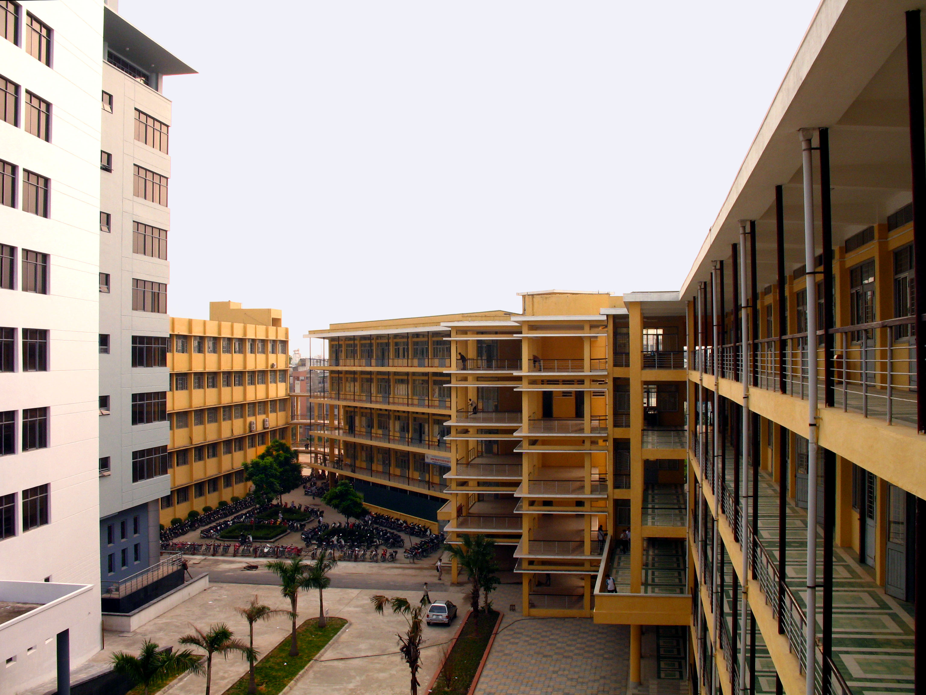 Trường đại học Bách Khoa Hà Nội Hình do thành viên tải lên tự chụp